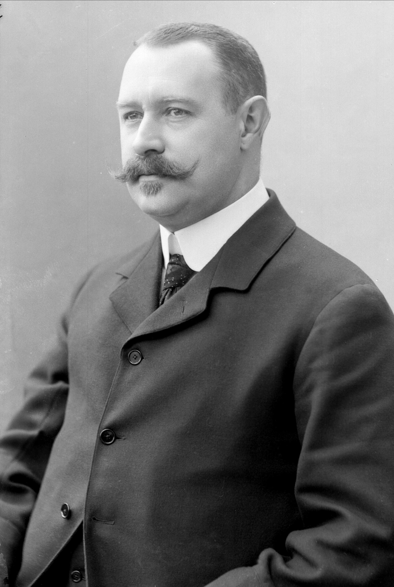 Christian Thams